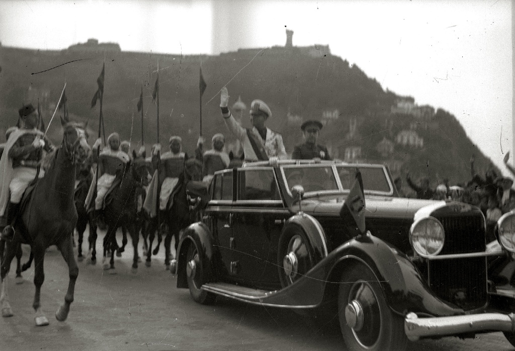 Título original: Francisco Franco escoltado por la Guardia Mora visita San Sebastián una vez finalizada la guerra (2/8) Localización: San Sebastián (Guipúzcoa)